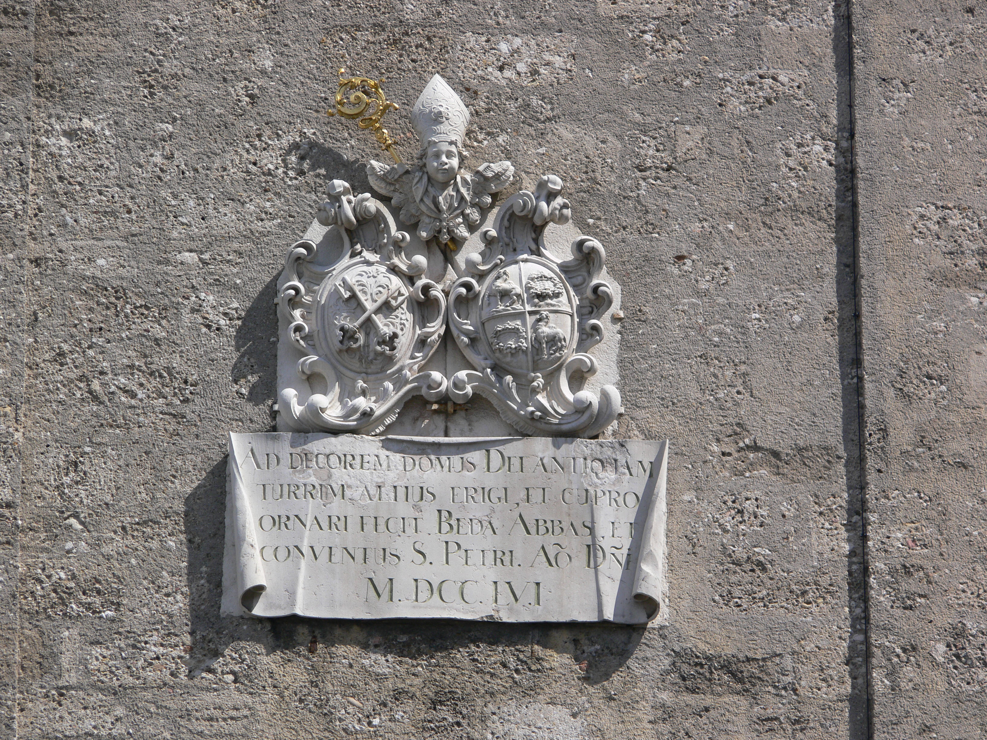 Salzburg, Erzabtei (Stift) St. Peter Innenhof, Wappen des Stifts und des Abts Beda Seeauer und Inschrift am Turm